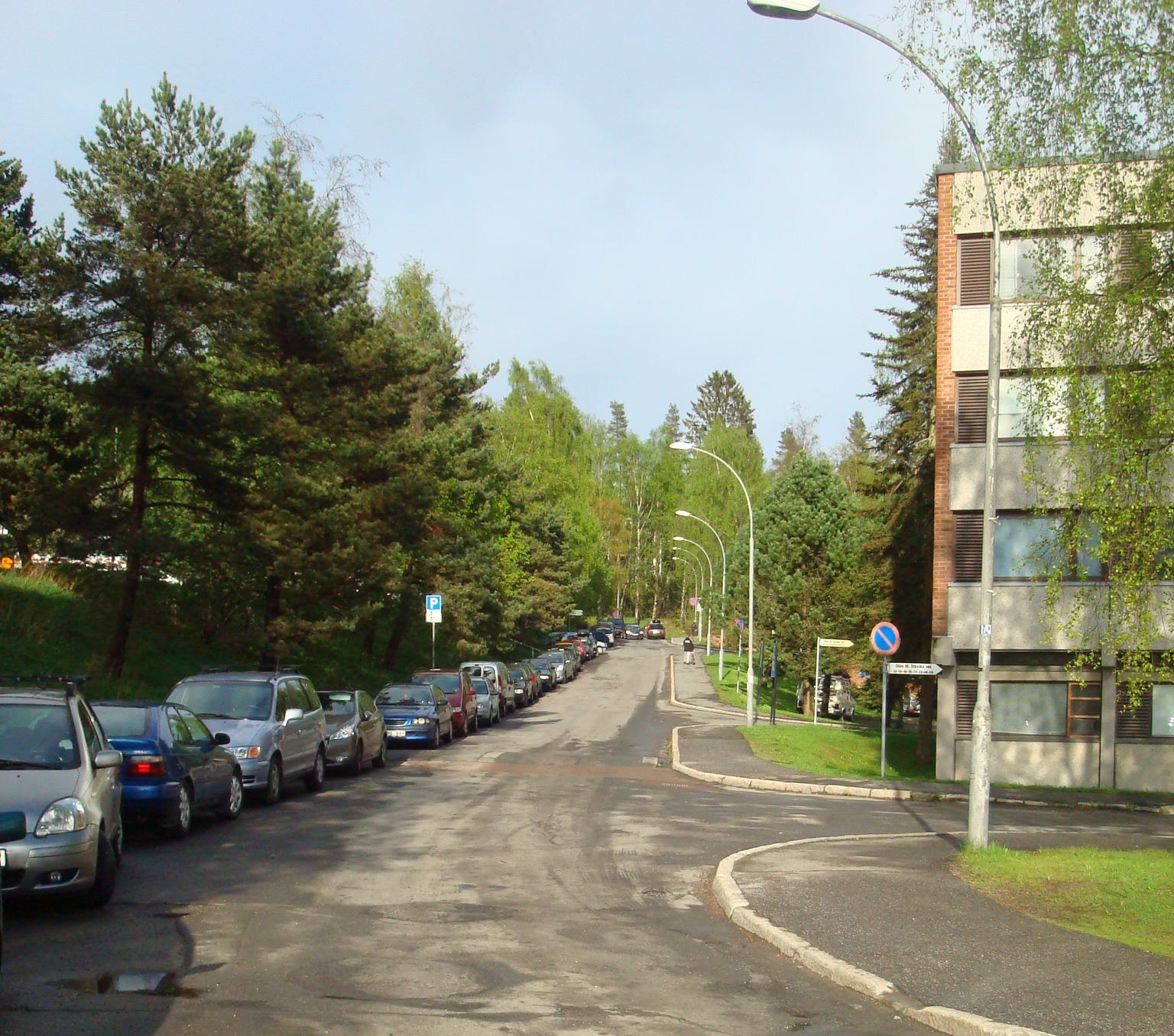 Olav M. Troviks vei i Oslo. Kringså studentby til høyre i bilde.